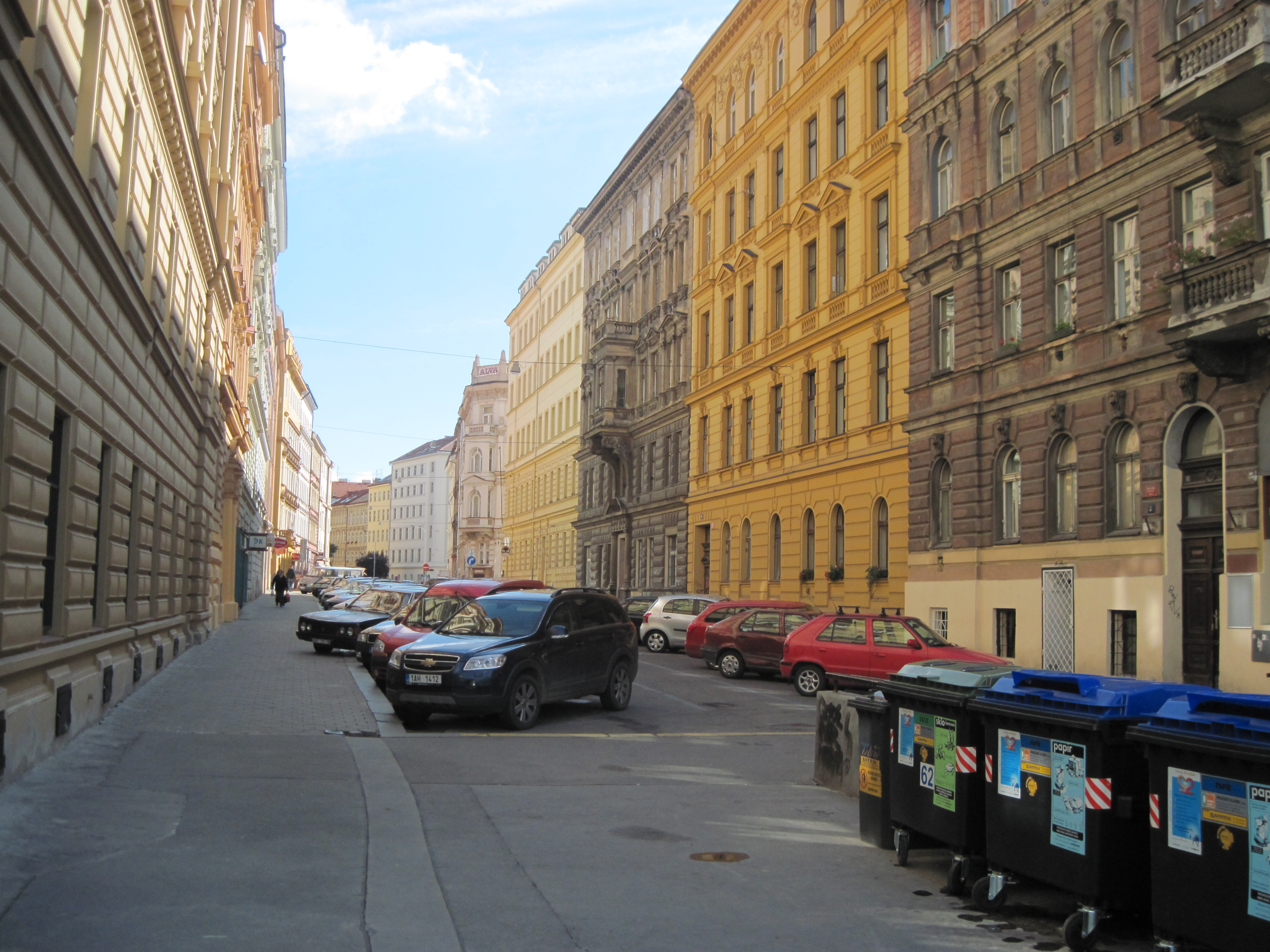 Praha